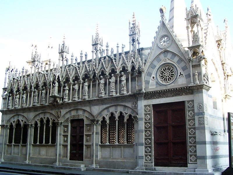 Pisa - Chiesa di S. Maria della Spina